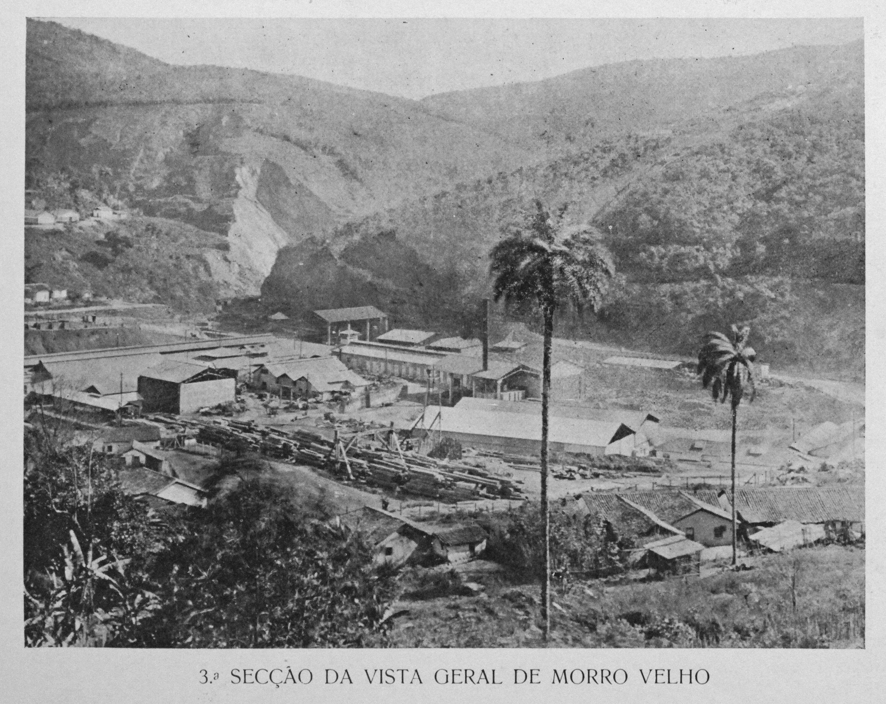 Revista Kosmos - Ano IV - Número 10 - Outubro de 1907